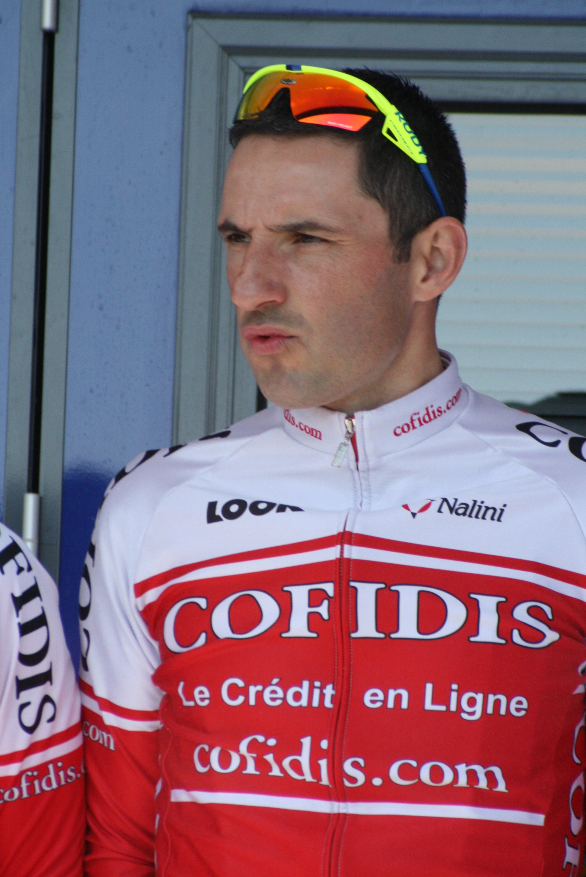 Présentation des coureurs au départ de la première étape Arnaud Labbe